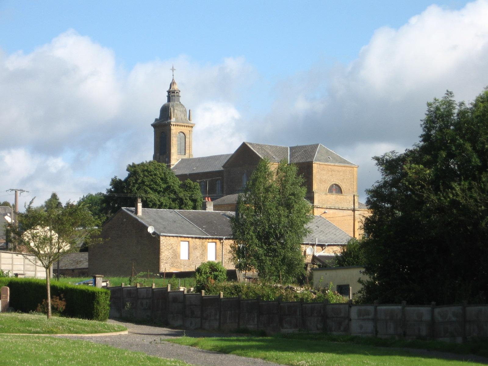 Eglise de rimogne